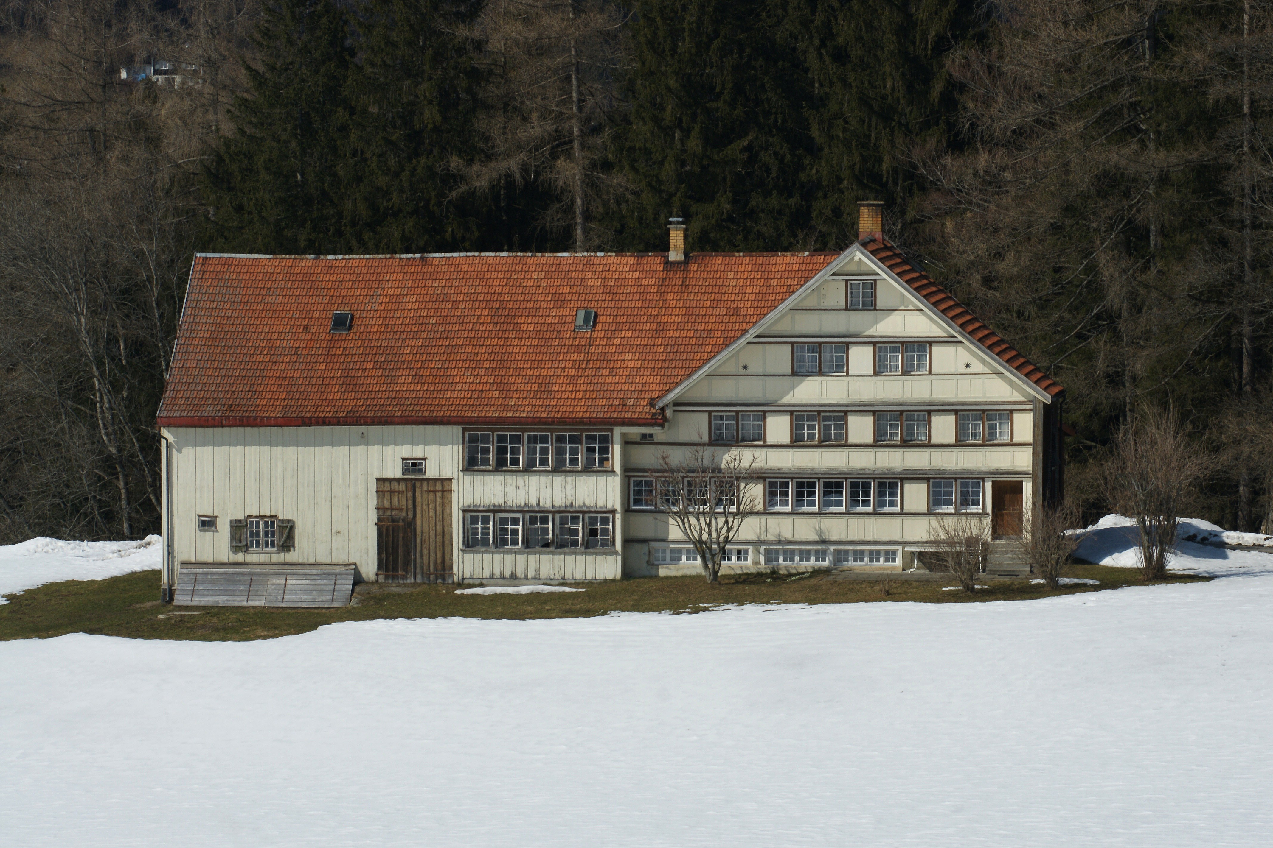 Appenzeller Bauernhaus auf der Ebni in der Parzelle Hopsbermoos in Trogen im Kanton Appenzell Ausserrhoden. Charakteristischer Appenzeller Hof mit seiner gebänderten Fassade, dem Kreuzgiebel und dem traufseitig angebauten Stall.